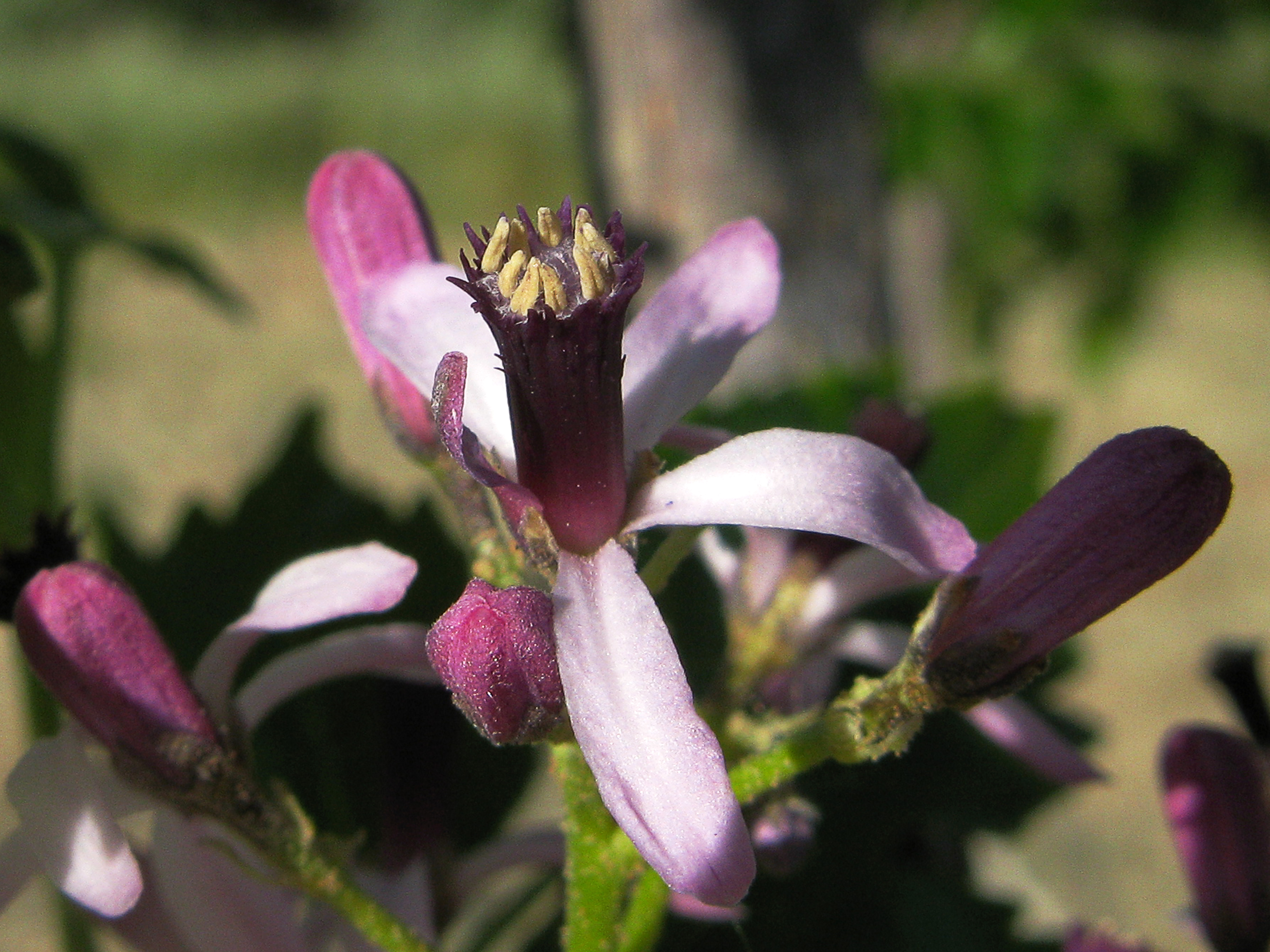 Llamado popularmente cinamomo, agriaz, lila, paraíso sombrilla o árbol del paraíso . Nativo del sudeste asiático Se cultiva aún para decoración y sombra, sobre todo por su ancha y frondosa copa, a la que debe su nombre común.